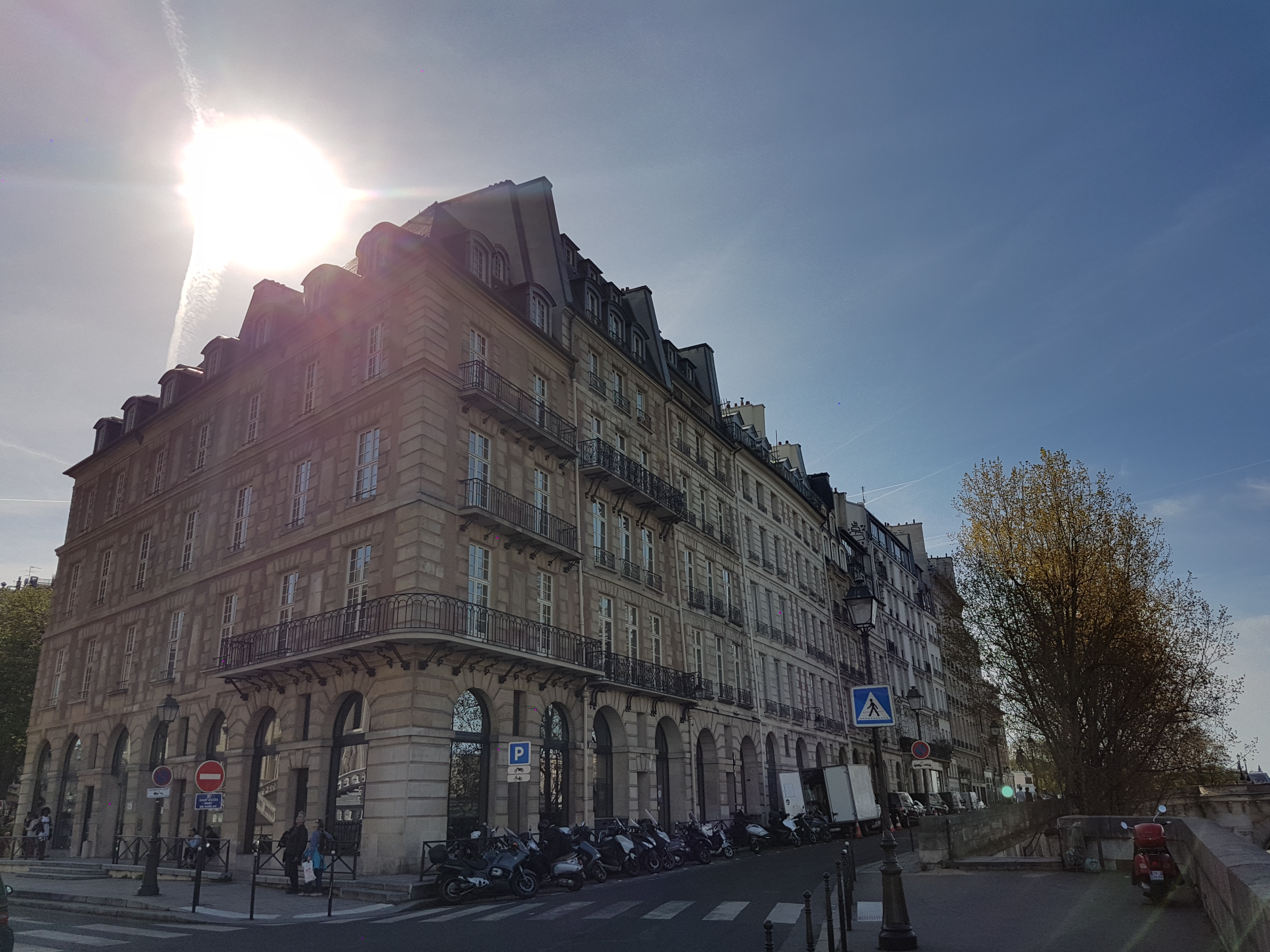 rue de Harlay (à gauche) et quai de l'Horloge (à droite) à Paris, en mars 2017. Les immeubles au numéro 19 du quai (à l'angle de la rue de Harlay), 21 et 23 ont été réunis, rénovés et réaménagés dans les années 1990, formant un ensemble baptisé « Hôtel de Harlay ». Celui-ci accueille depuis la « Maison du barreau de Paris », dont le restaurant et salon de thé occupe les anciens locaux du restaurant disparu Aux Trois Marches. Cet établissement inspira Georges Simenon pour la fictive et célèbre Brasserie Dauphine, apparaissant dans des romans et nouvelles dont le commissaire Maigret est un protagoniste.